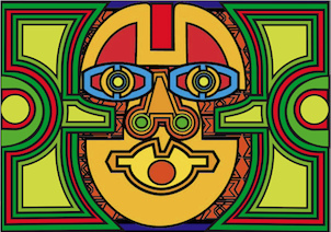 tete multimedia